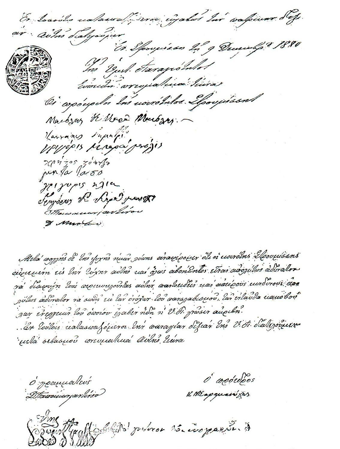 Писмо до струмишките първенци на митрополит Агатангелос Папагригориадис